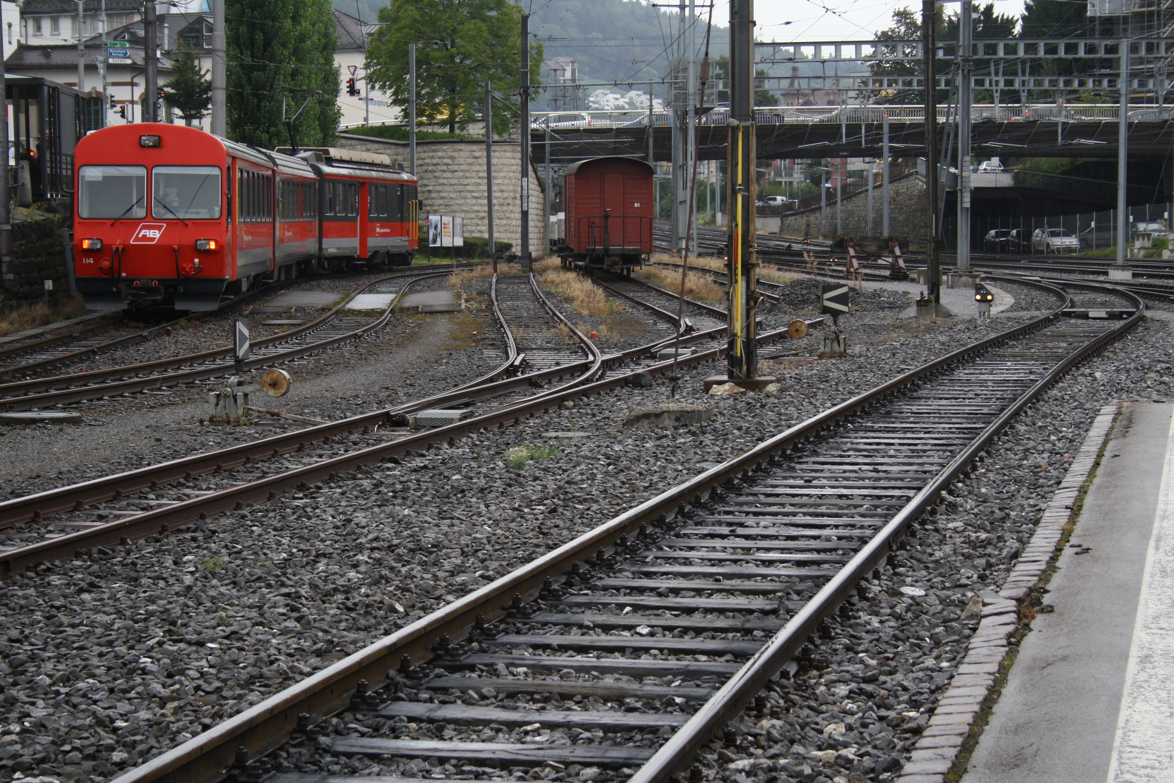 Nebenbahnhof St. Gallen der Appenzeller Bahnen. Links aussen fährt ein Zug nach Appenzell aus. Daneben Abstellgleise der ehemaligen Trogenerbahn mit dem Güterwagen Gkb 61